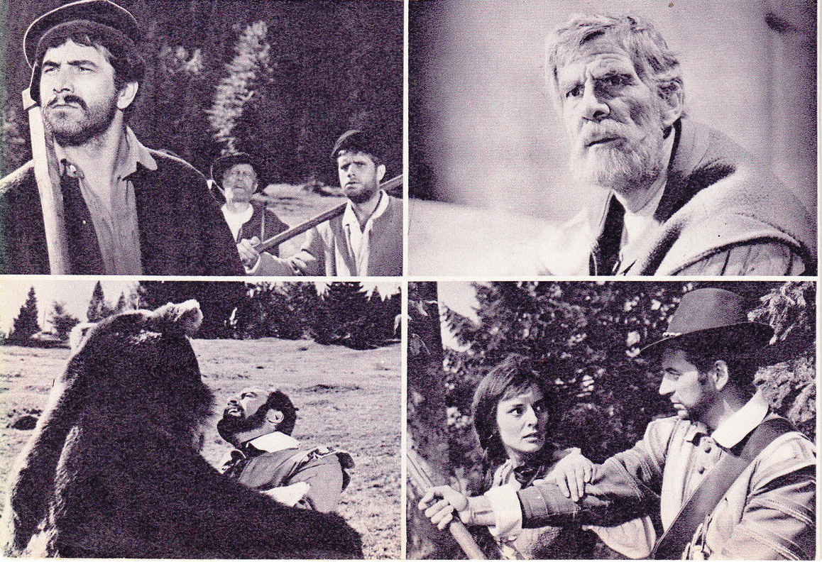 Brošura filma Amandus.